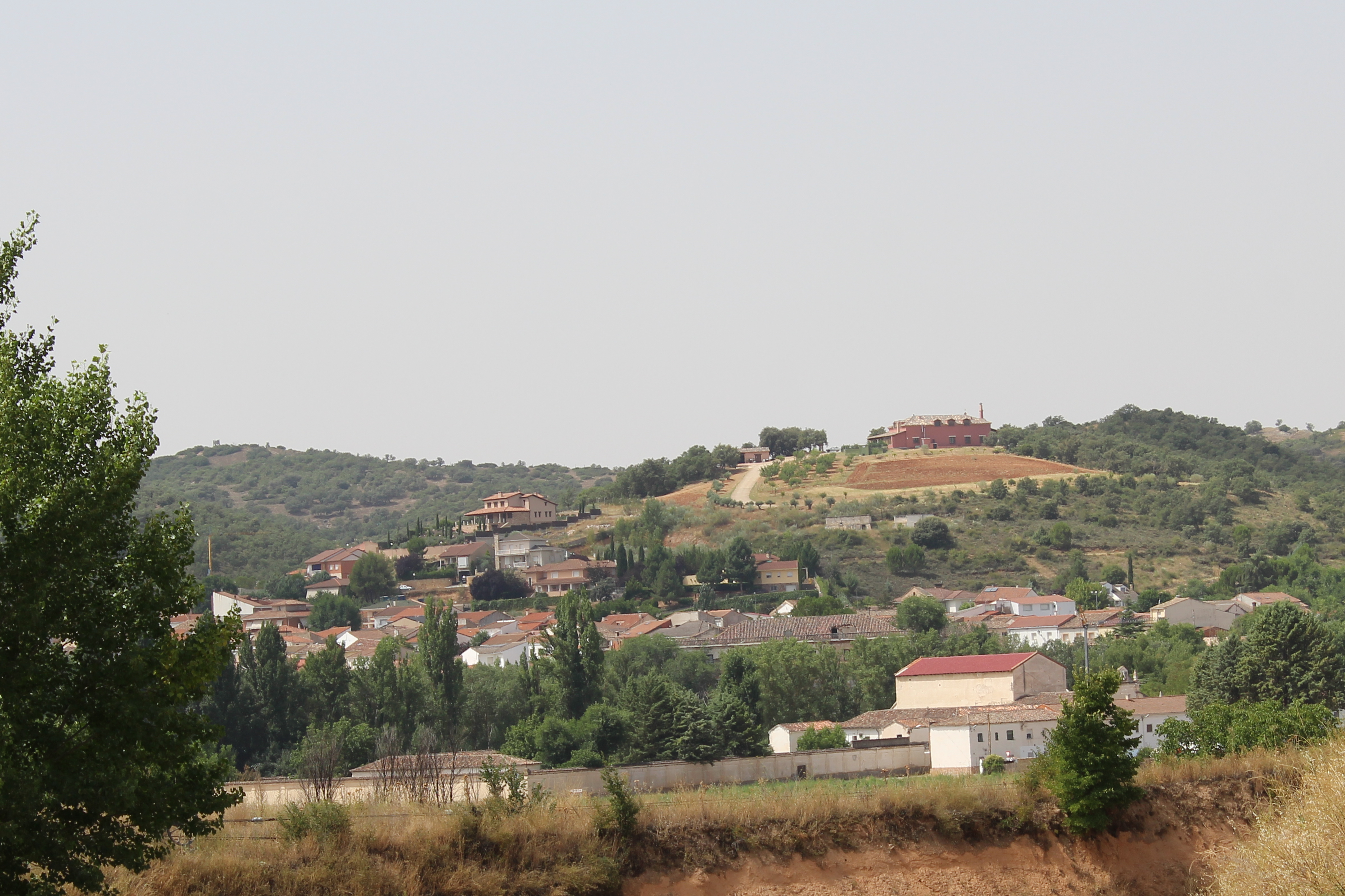 Espinosa de Henares, Espinosa de Henares, provincia de Guadalajara.